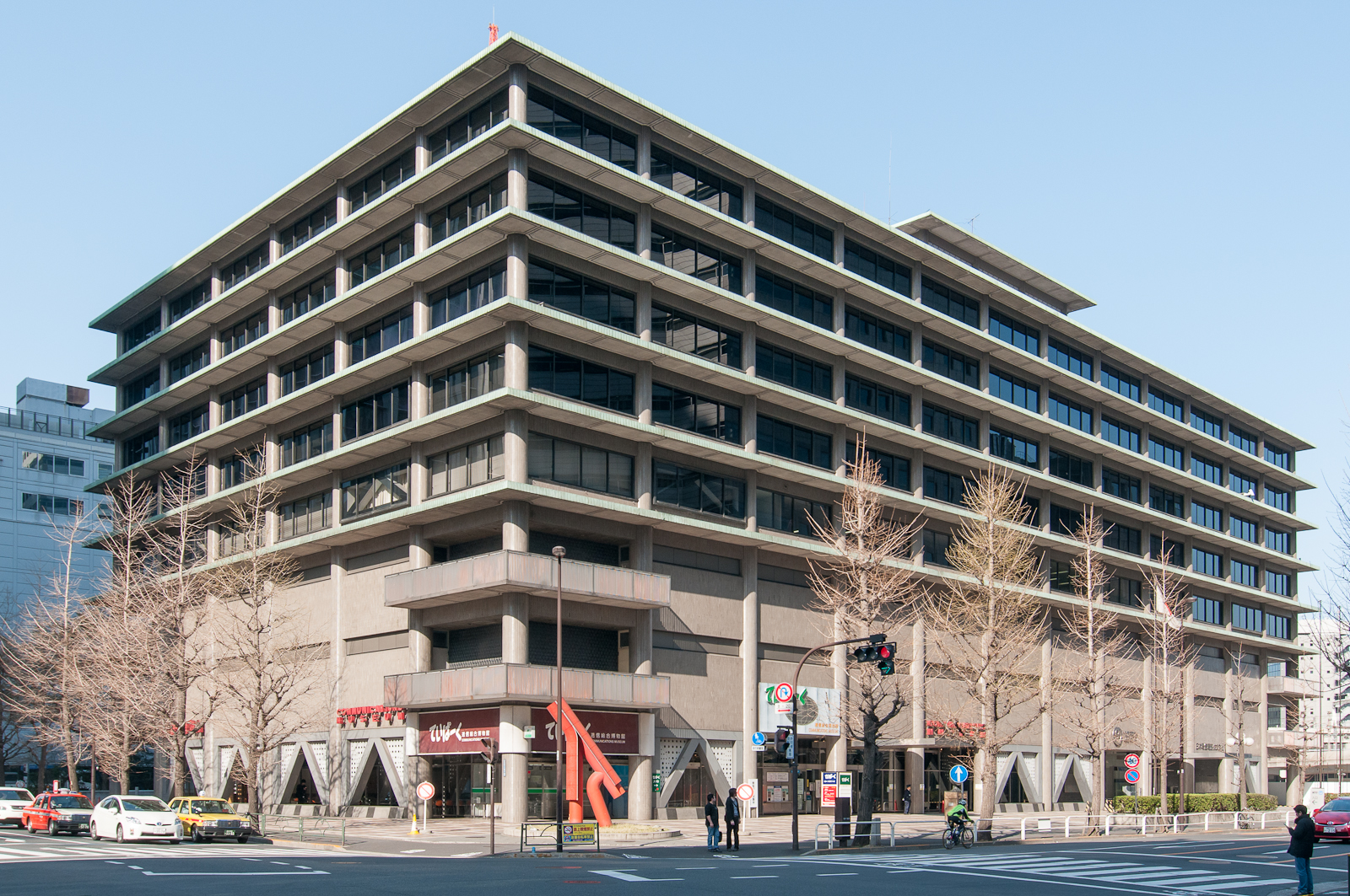 逓信総合博物館。